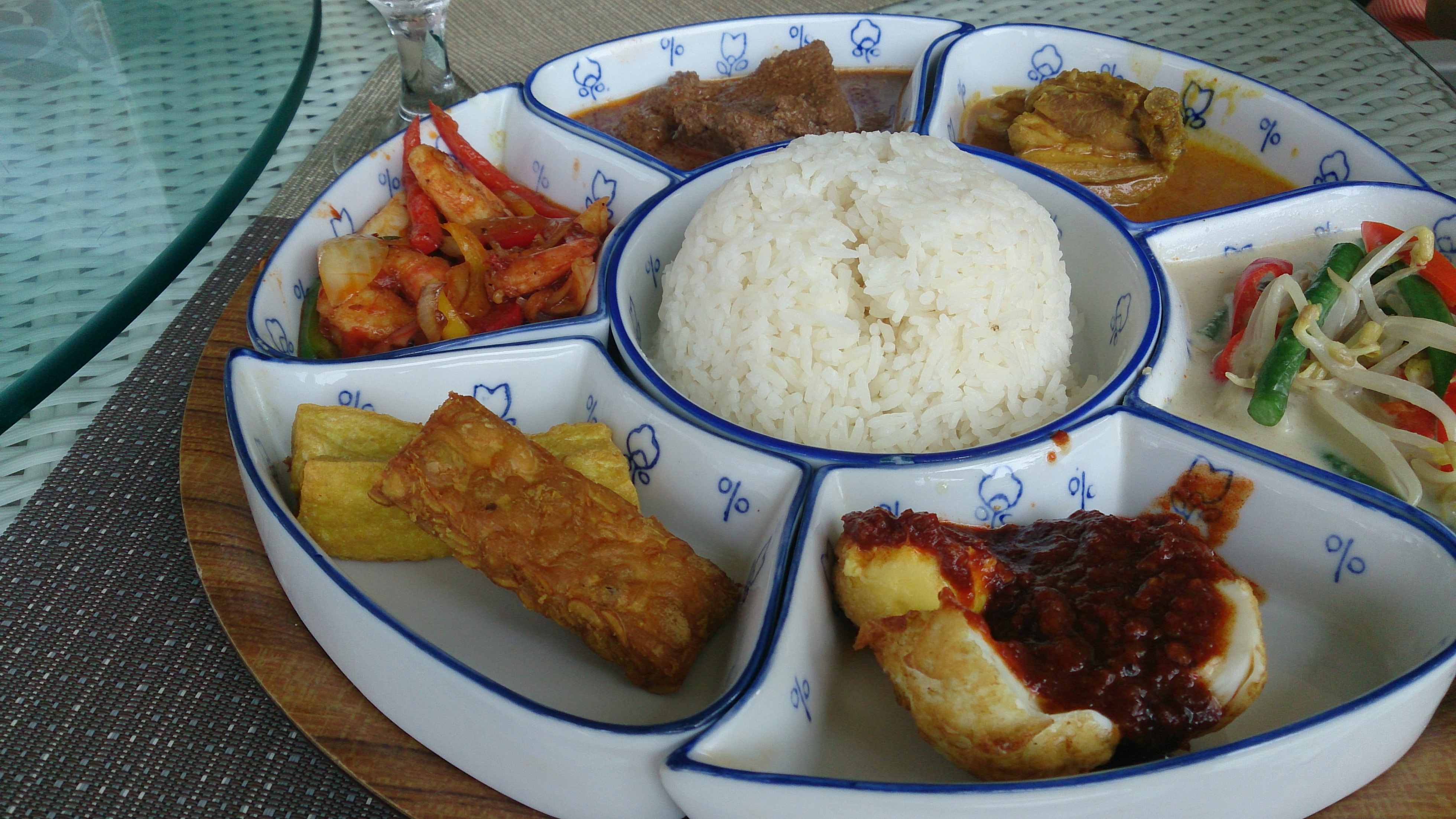 delicious!